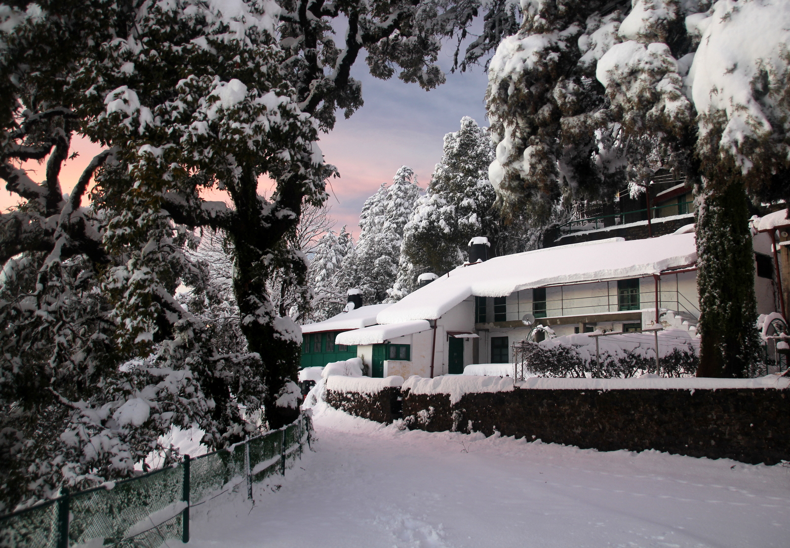 Ellangowan Snow